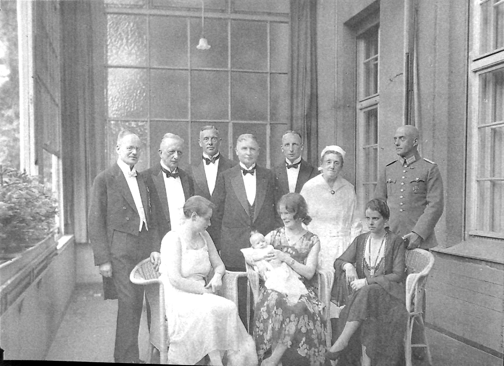 Das Bild zeigt die Feier aus Anlass der Taufe von Ruthard Groener. In der Bildmitte sitzend die Mutter Ruth Groener, geb. Glück mit dem Täufling, dahinter stehend in der Mitte der Vater Reichswehrminister General Groener, links von ihm Hans Georg Oskar Schulz, rechts Korvettenkapitän Hubert Schmundt, zweiter von links Feldprobst Friedrich Gottlob Erich Schlegel, der den Taufgottesdienst in der Berliner Garnisonkirche geleitet hatte.